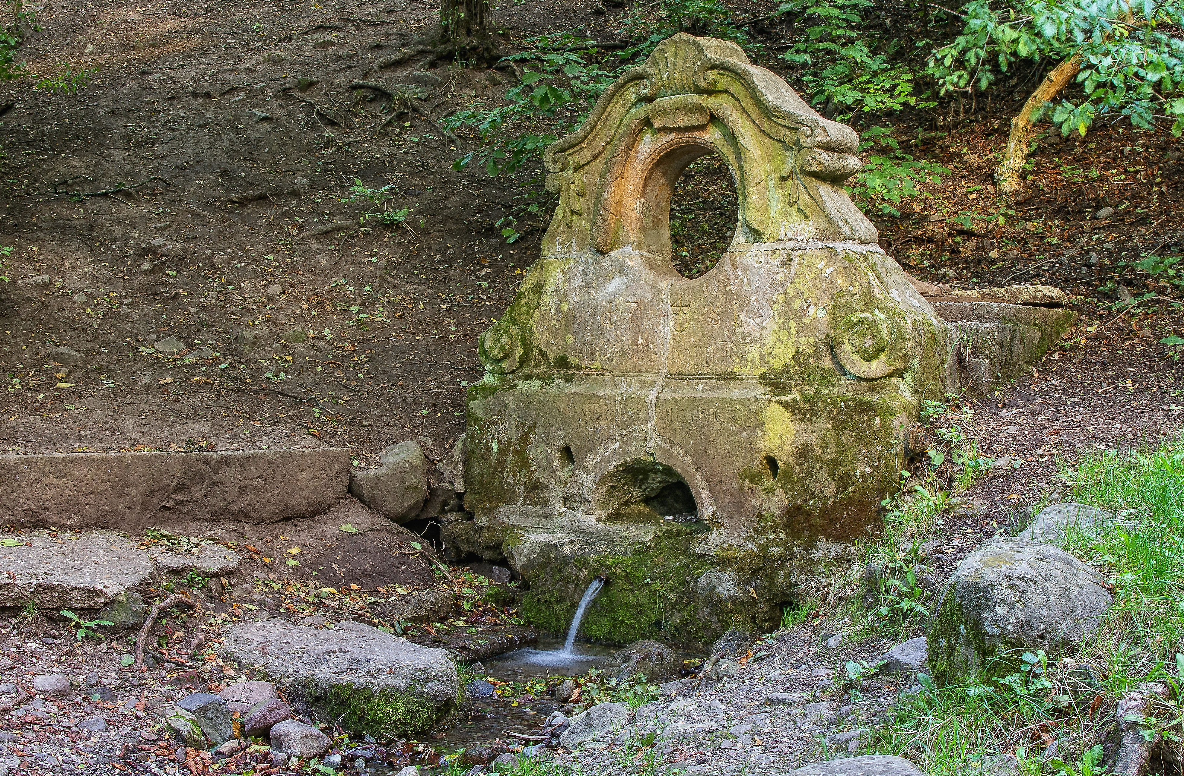 Szabadság forrás foglalata – Sztara Voda. Rokokó, 1781. Sima lábazat, középen félköríves nyílás. A kő oromzatot kétoldalt voluták fogják közre. Az oromzatot párkánya kagylódíszes. Középen copf füzérdísz. This is a photo of a monument in Hungary. Identifier: 7405